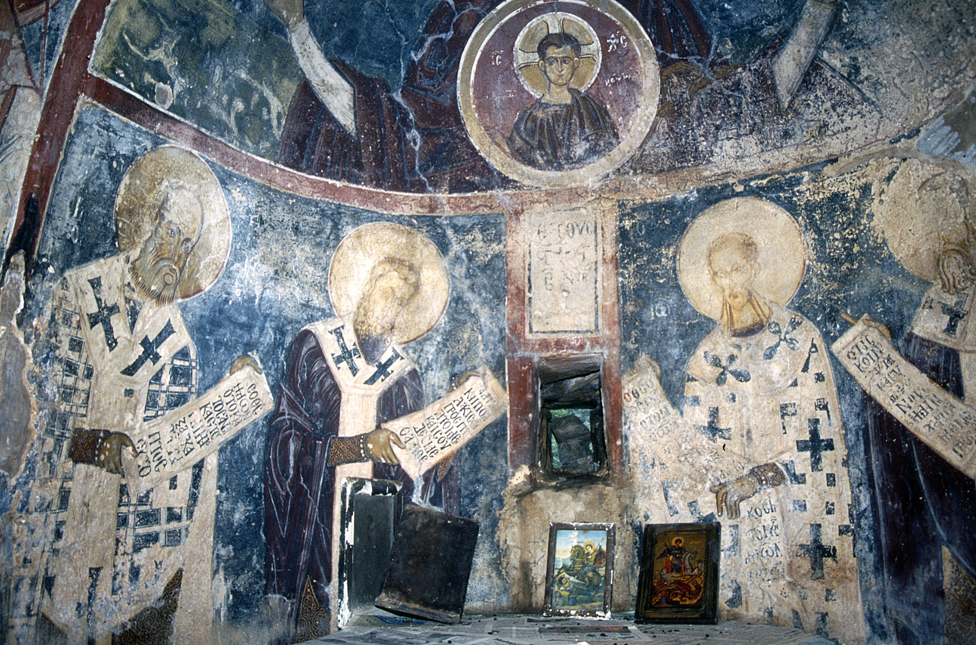 Agios Georgios außerhalb von Vathi, Apsis-Fresken (1284), Kirchenväter